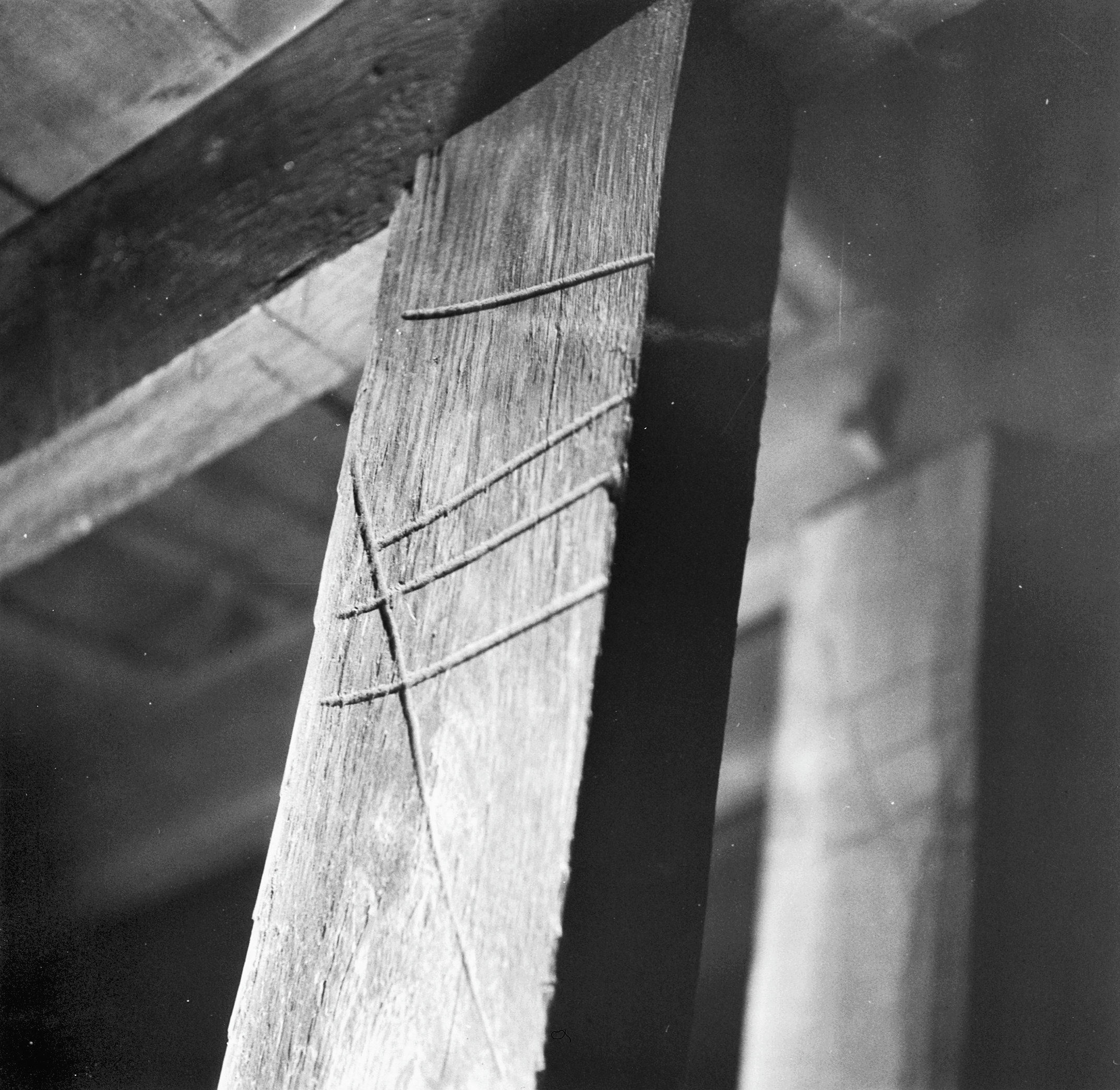 Oude Kerk: telmerken kap